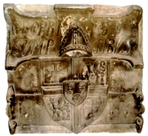 Relief mit dem Wappen des Bischofs Eberhard von Holle vom Amtshaus Kaltenhof